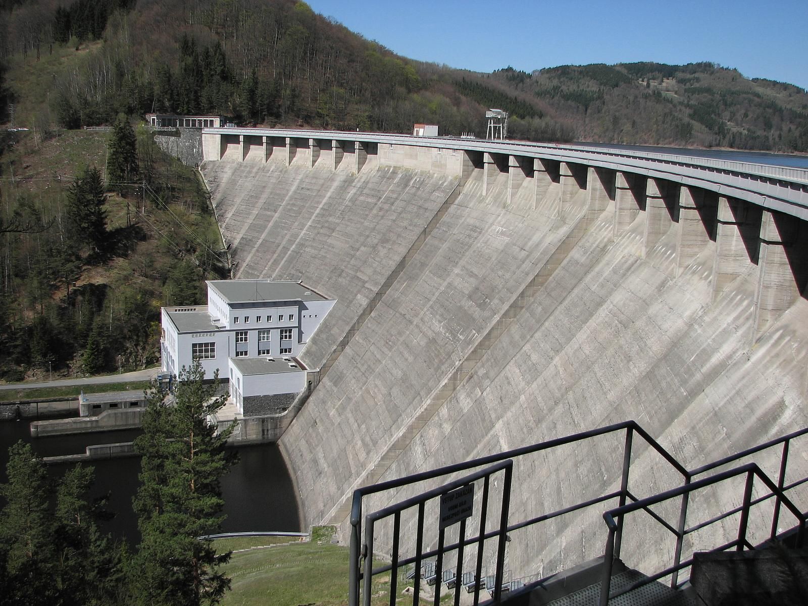 Vírská přehrada (Vír 1.) - těleso hráze